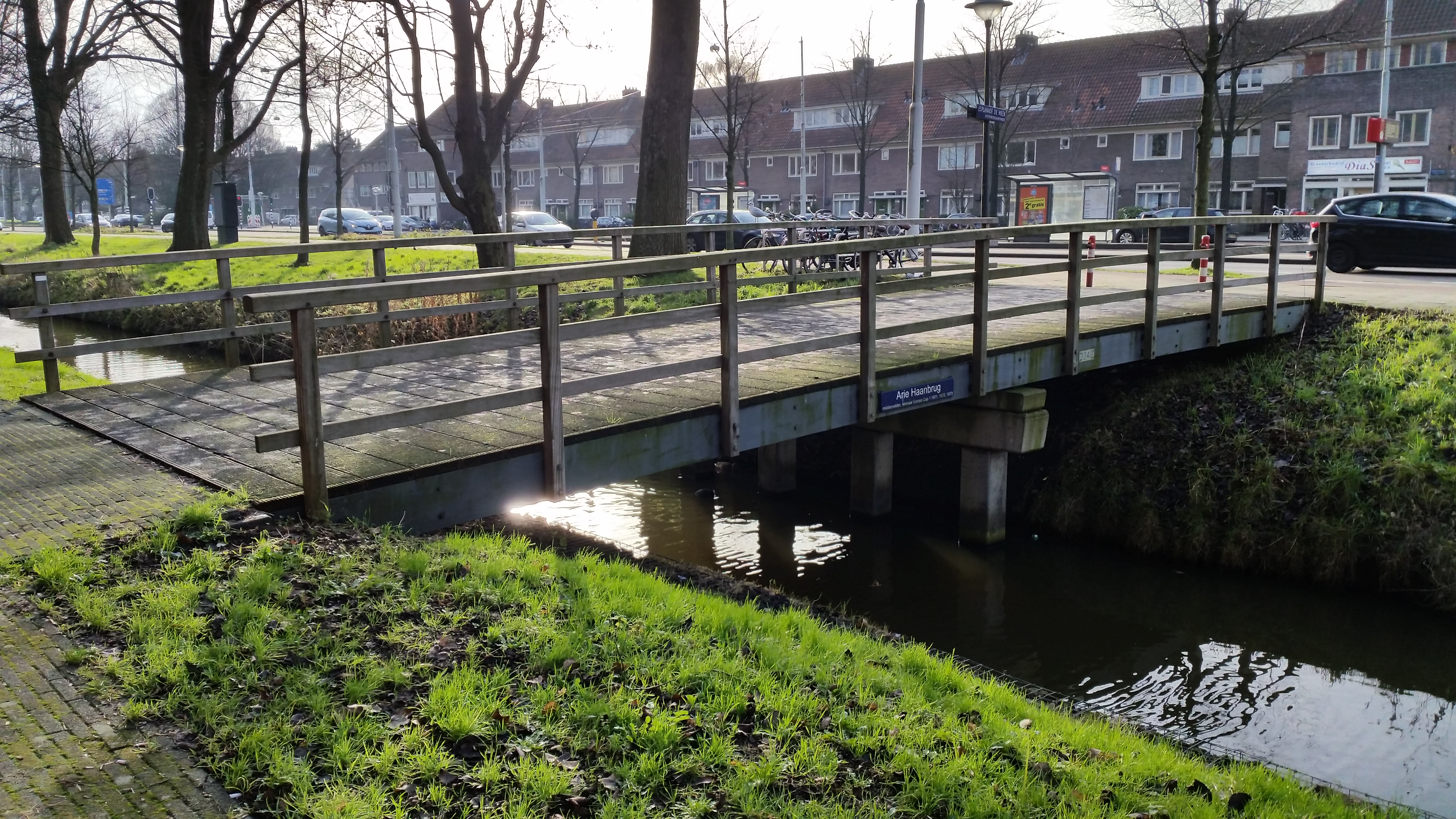 Impressies van de Arie Haanbrug in Watergraafsmeer